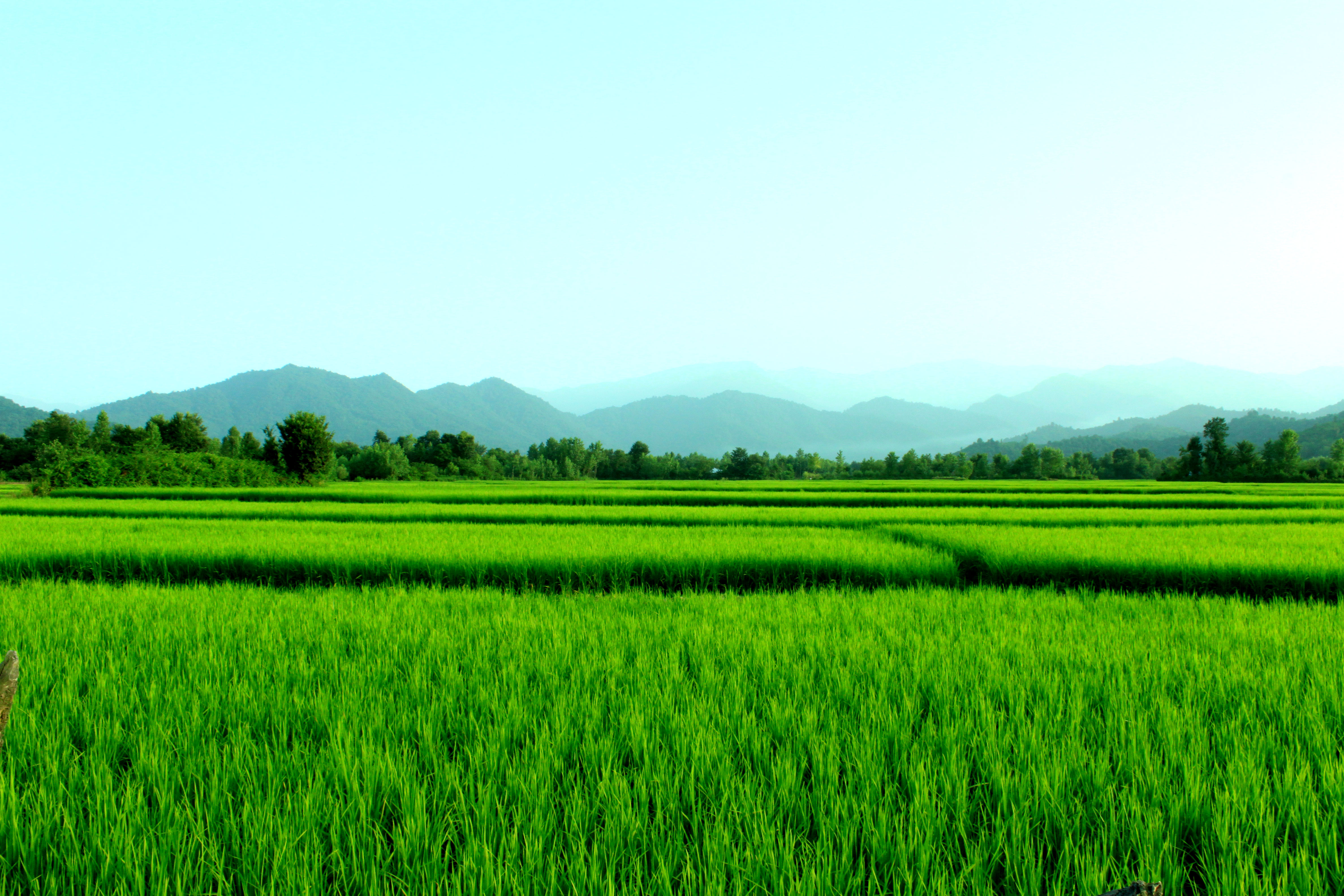 مزرعه برنج رمضان نیک نهاد